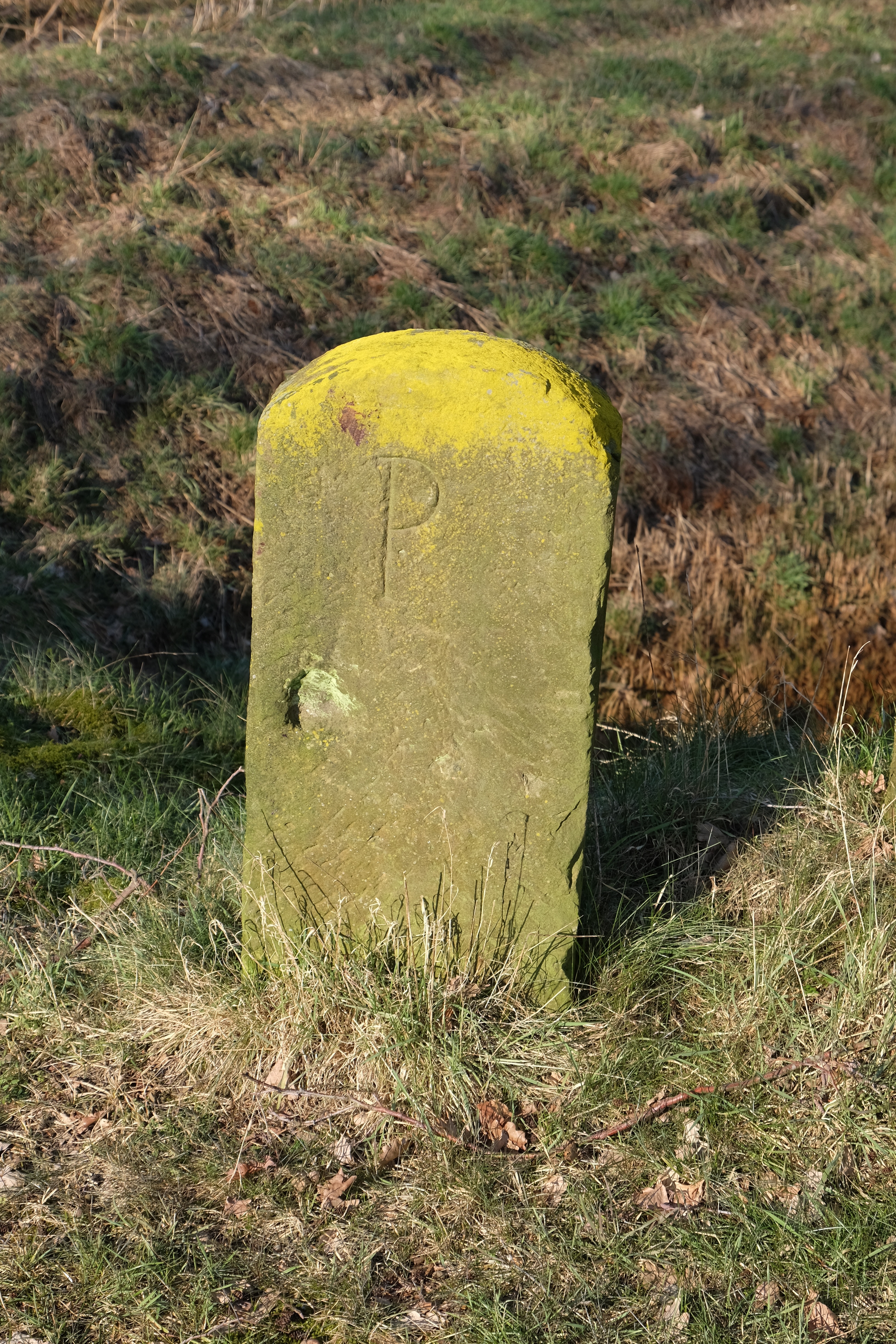 Grenzstein in Ostbevern NRW zu Niedersachsen, am Reidenbach